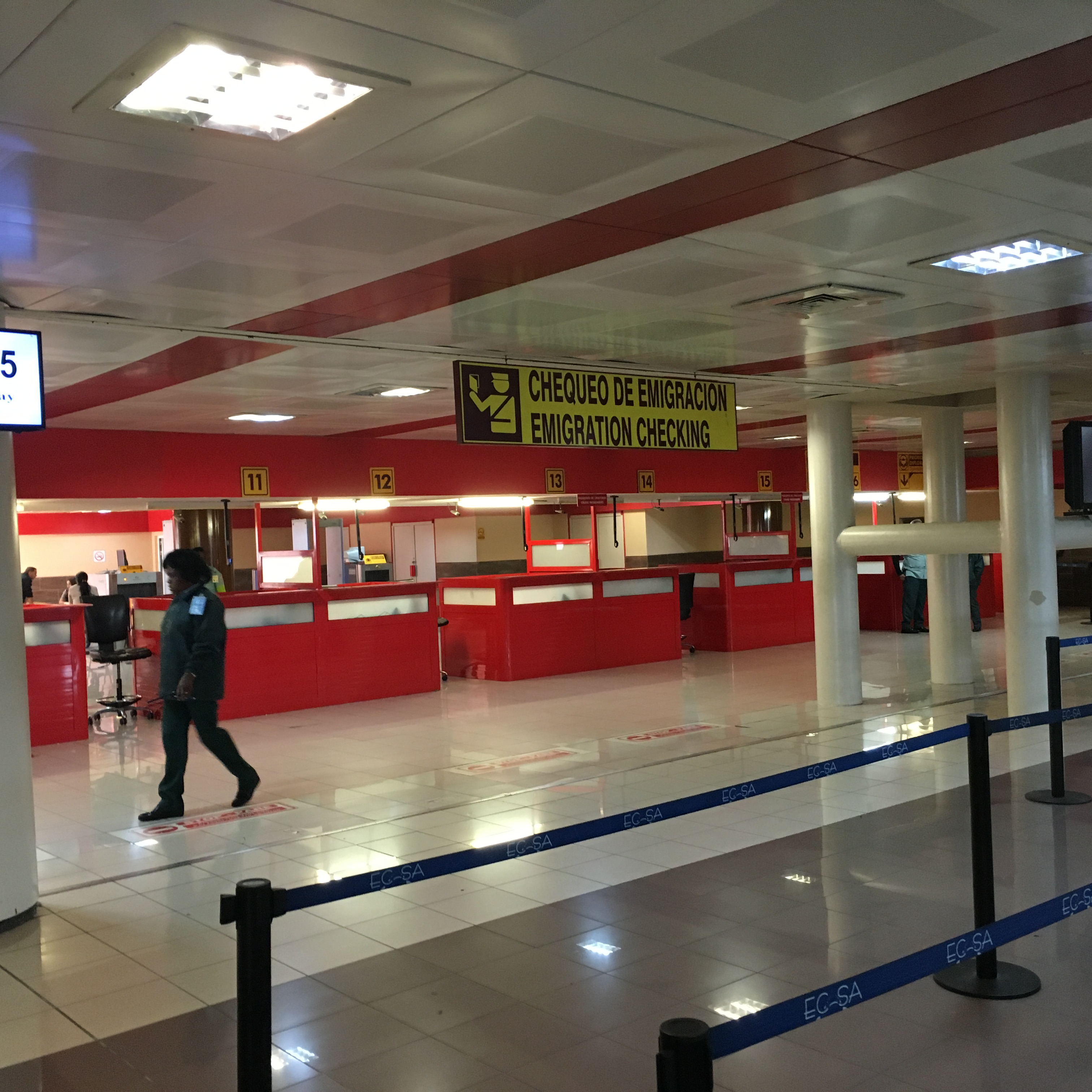 何塞马蒂机场海关移民检查区域